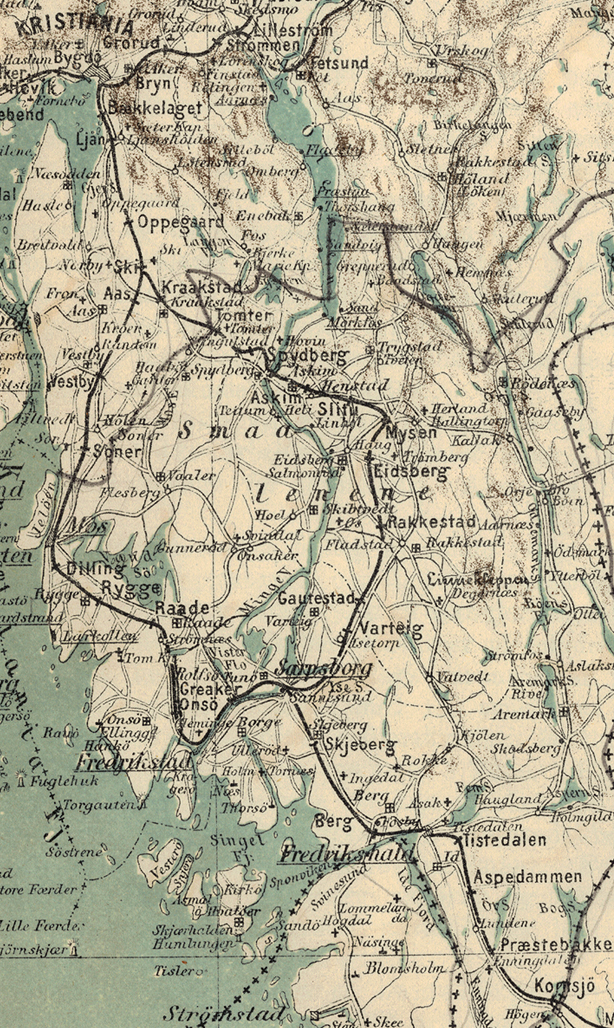 Kart over Smaalensbanen.